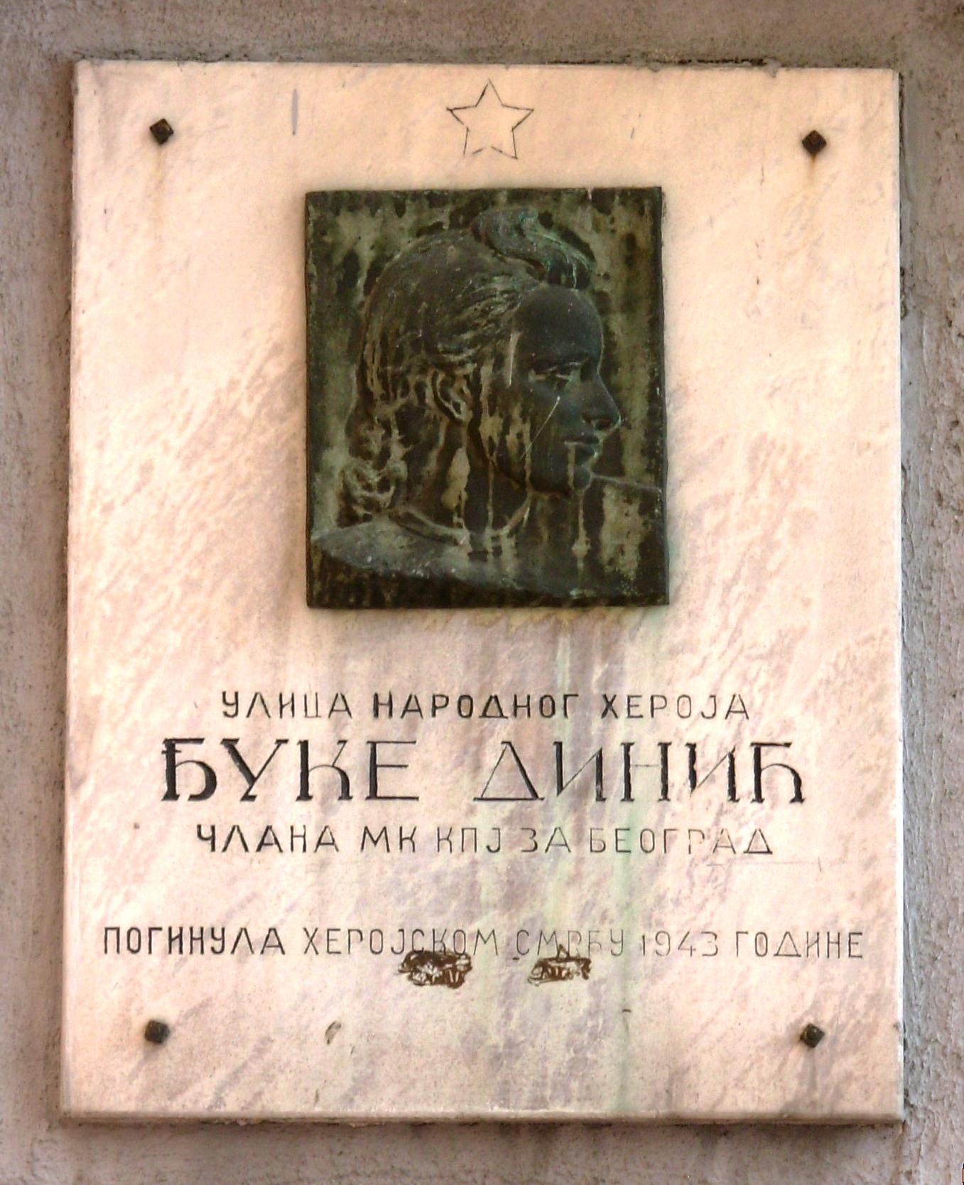 Tabla u ulici Đuke Dinić, Beograd. Slikao Goldfinger